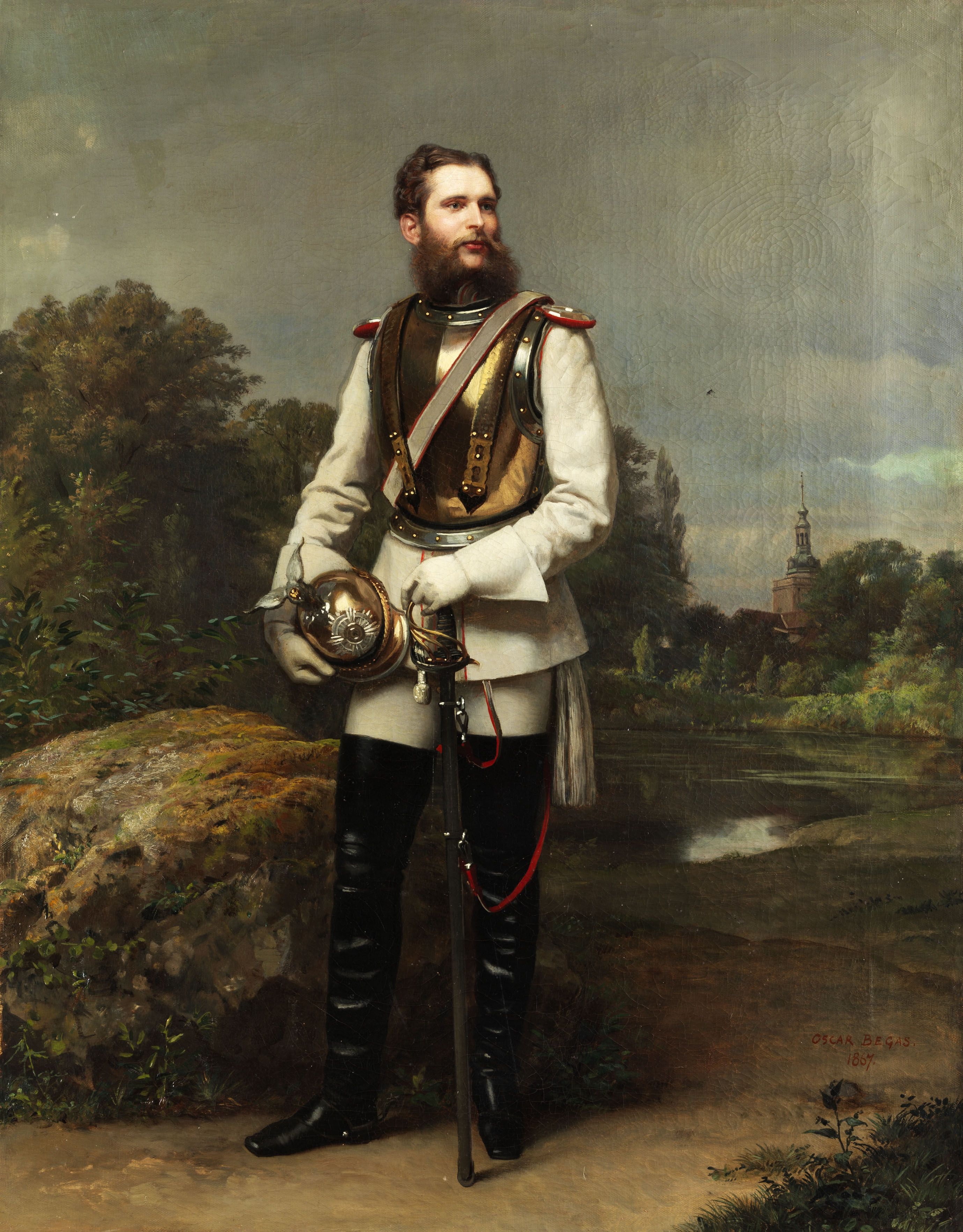 Kronprinz Friedrich Wilhelm von Preußen. Unten rechts auf Weg signiert und datiert „OSCAR BEGAS 1867“.